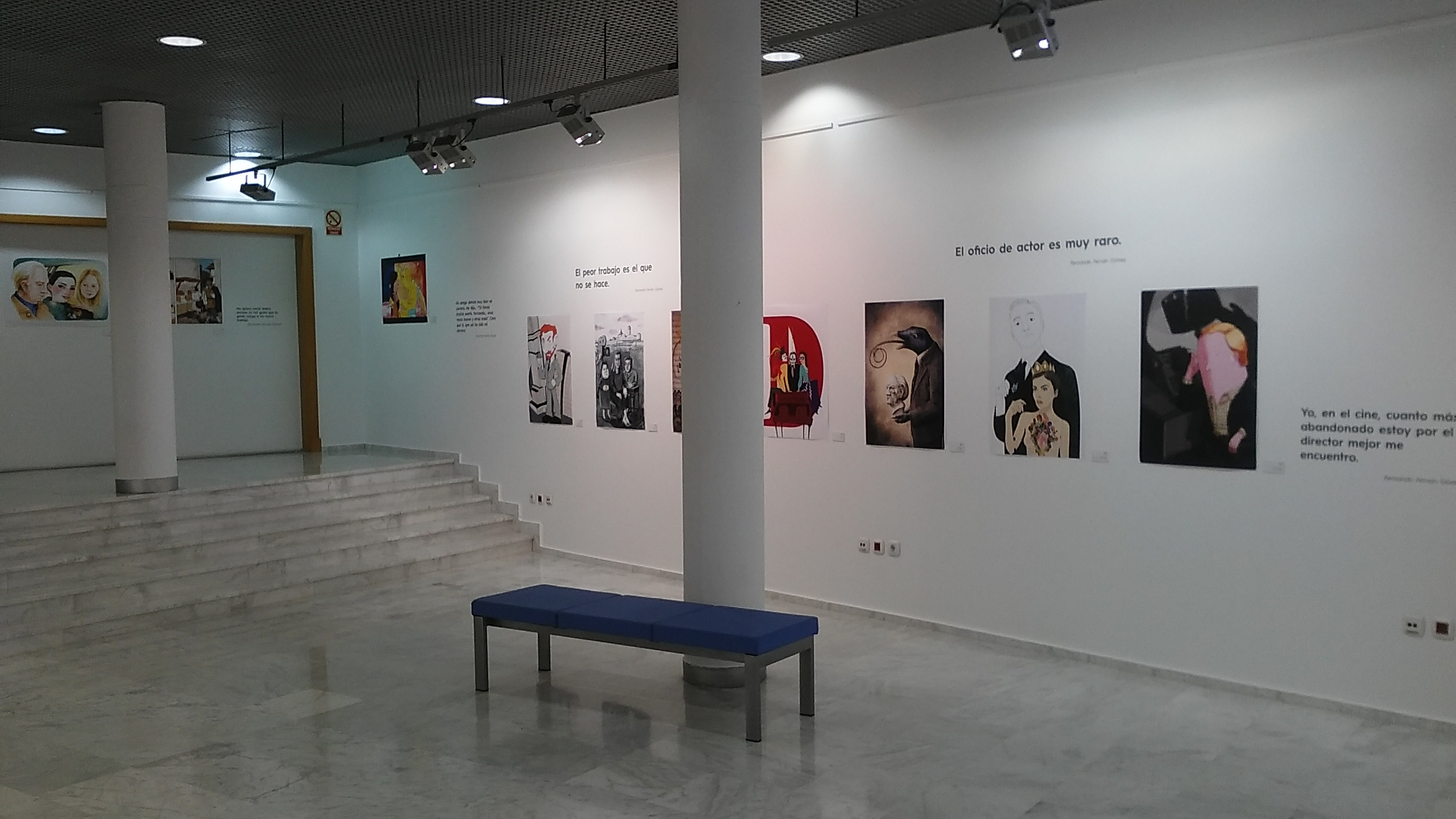 exposición Fernando Fernán Gómez - UCA